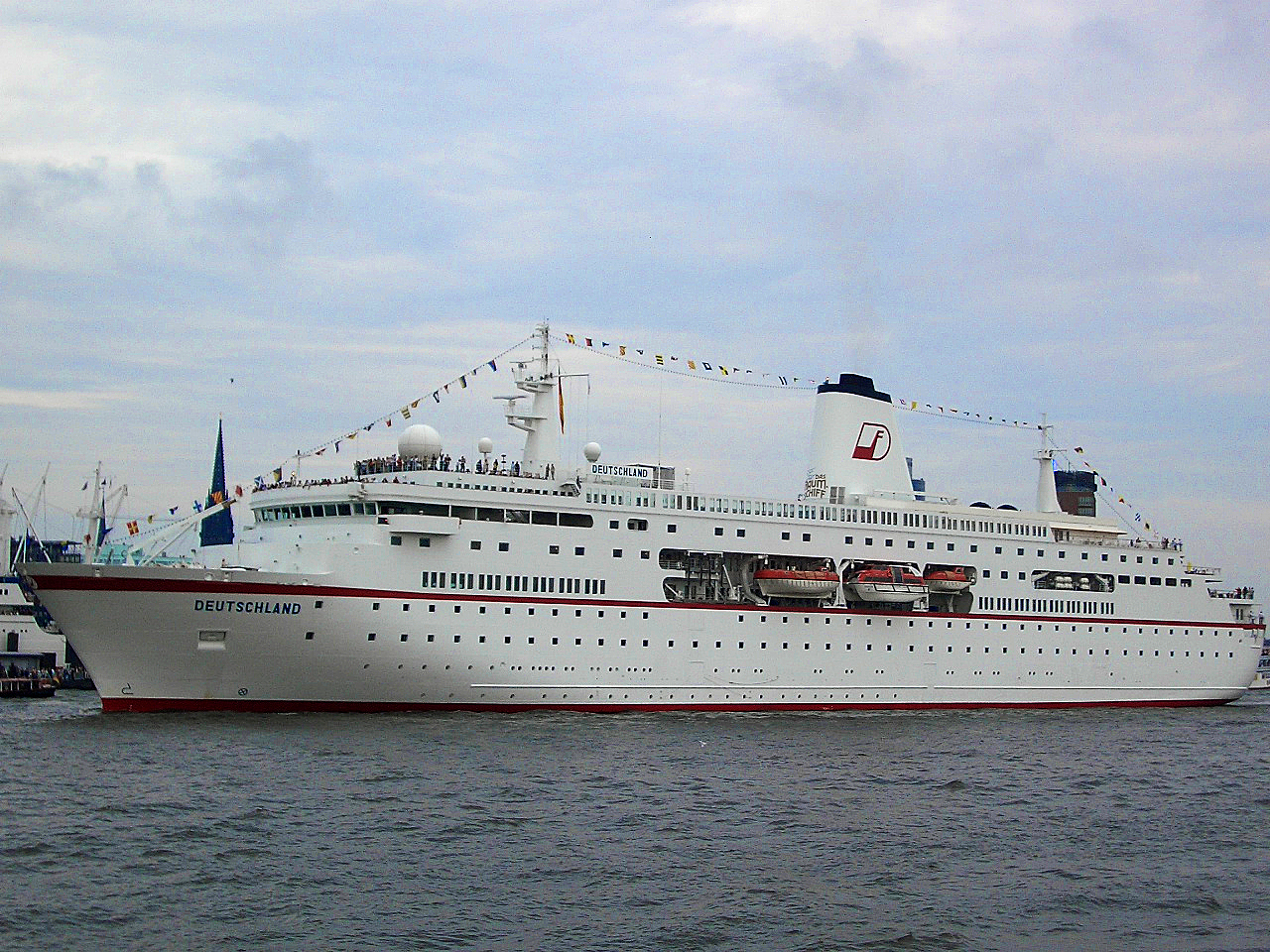 Kreuzfahrtschiff MS Deutschland in Hamburg IMO Number: 9141807 MMSI Number: 211274670 Callsign: DMMC Length: 175 m Beam: 24 m